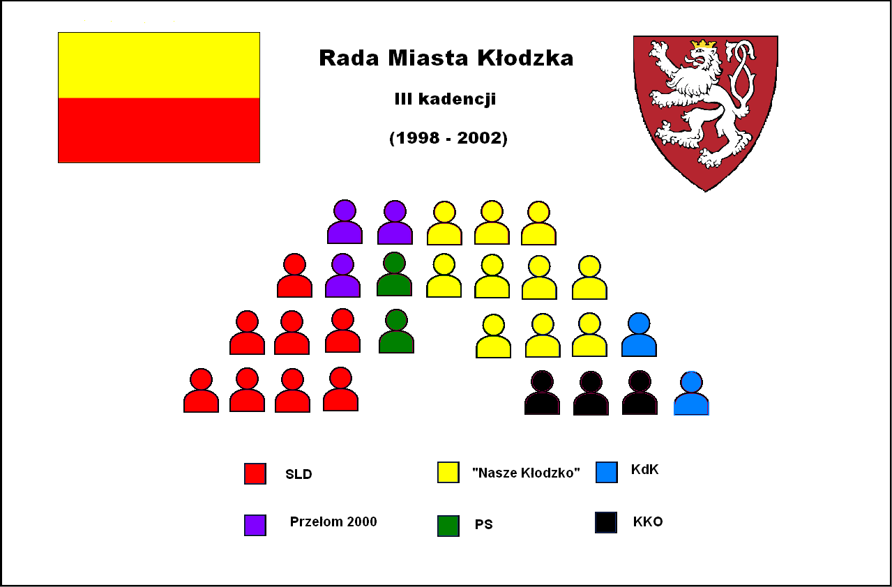 Rada Miejska w Kłodzku III kadencji (1998-2002) - podział mandatów